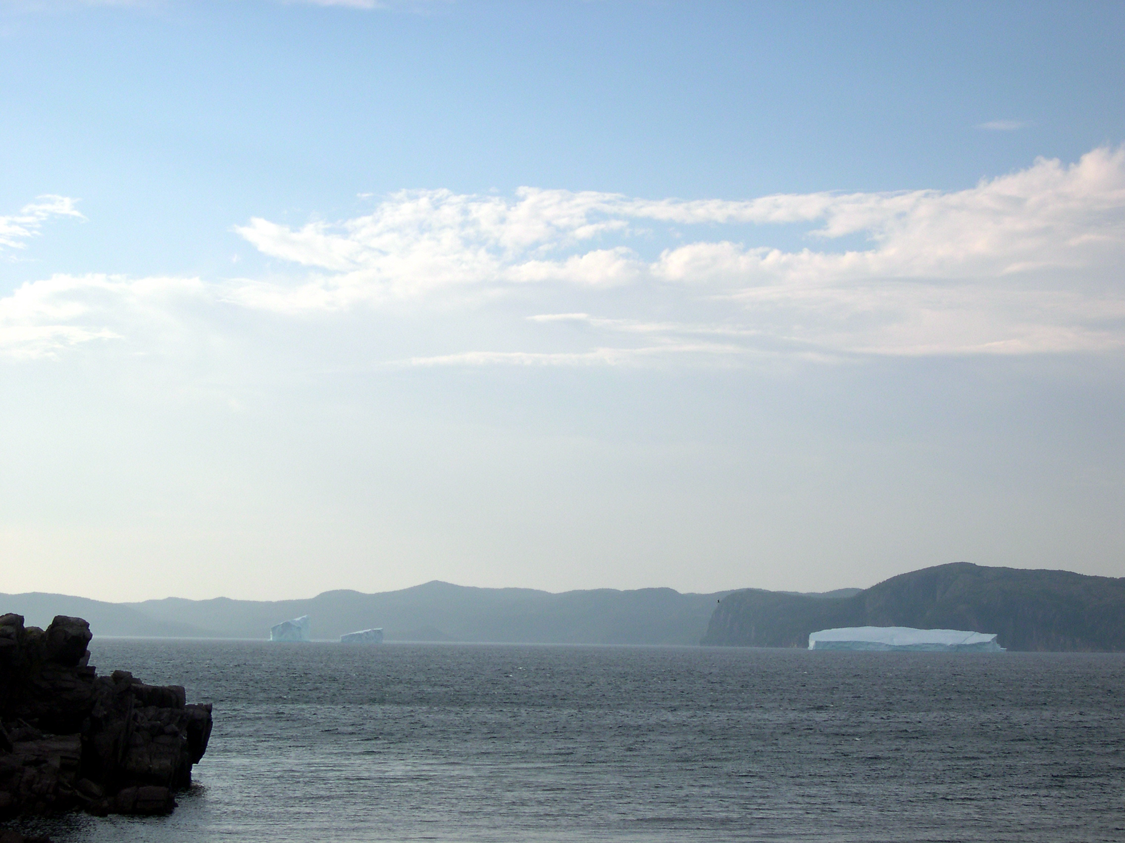 iceberg(s)